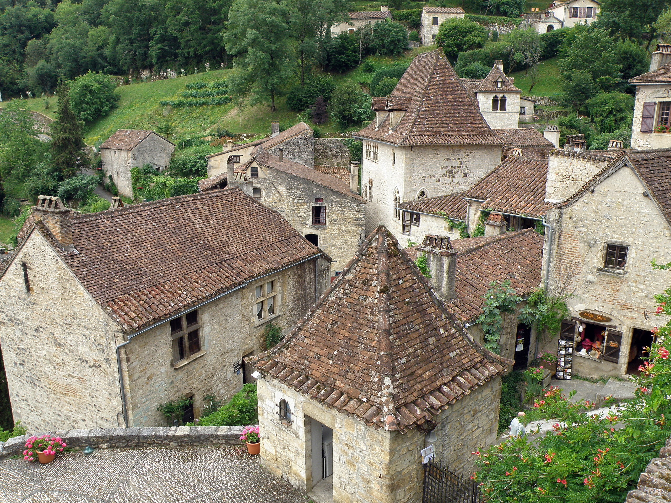 Saint-Cirq-Lapopie (Lot, France). Au centre droit, l'ancien hospice ayant appartenu au peintre catalan Pierre Daura, dit maison Daura.